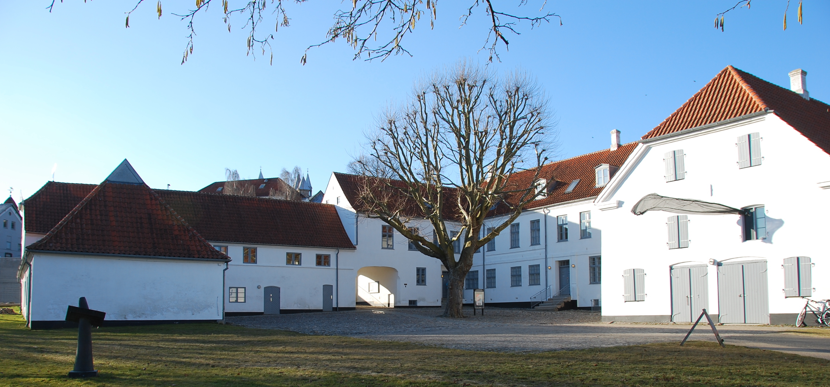 Brænderigården overfor Borgvold i Viborg.